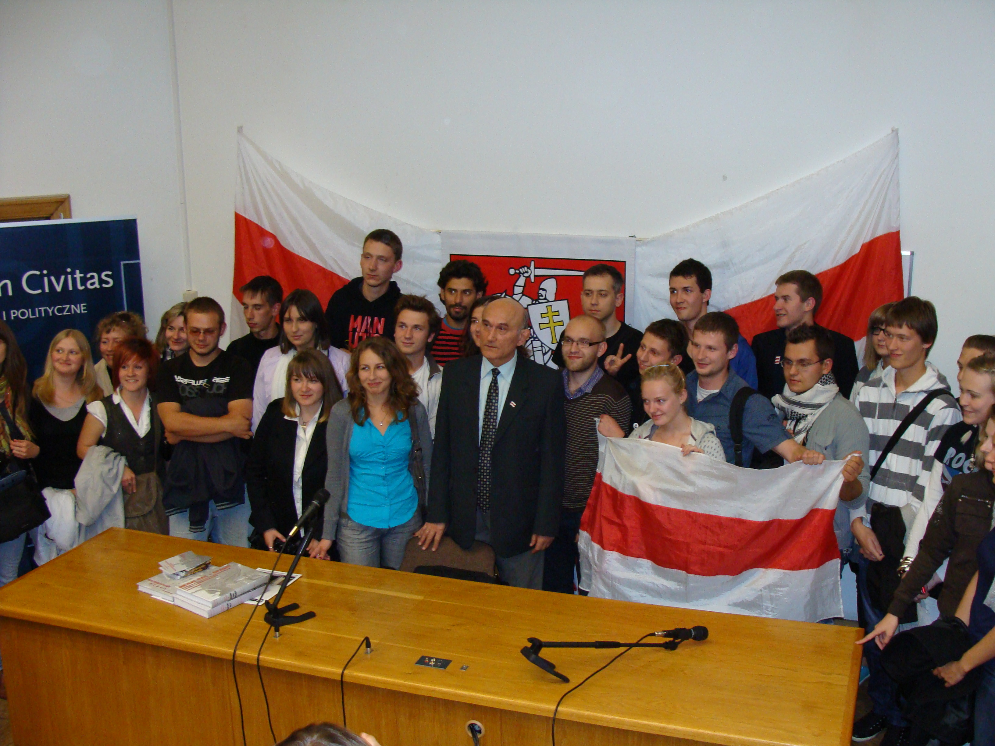 Zianon Pazniak na spotkaniu w Collegium Civitas w Warszawie.